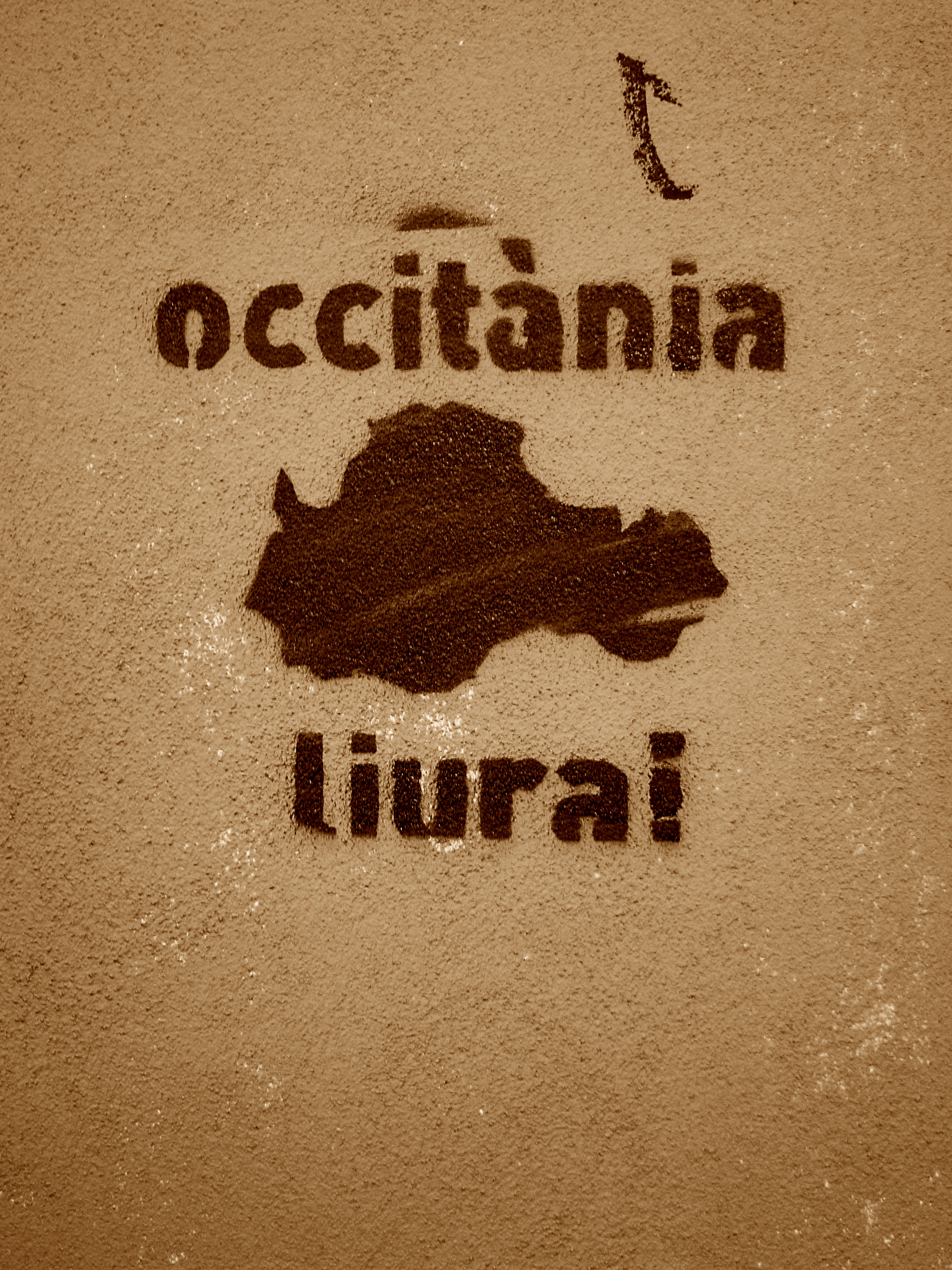 Toulouse (Haute-Garonne, Midi-Pyrénées, France) : Pochoir occitaniste à la fac du Mirail.